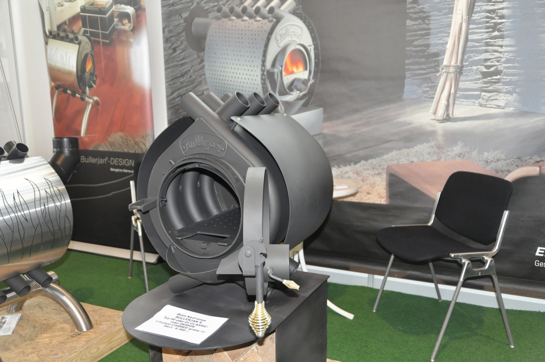 Messe HAUS HOLZ ENERGIE 2012 in Stuttgart Dieses Foto entstand durch Unterstützung des gemeinnützigen Vereins Skillshare.eu Skillshare e.V. ist ein eingetragener gemeinnütziger Verein zur Förderung der Bildung durch Unterstützung der Erstellung, Sammlung und Verbreitung so genannten freien Wissens. IBAN: DE16 8306 5408 0004 8850 66 BIC: GENODEF1SLR Bank: VR-Bank Altenburger Land